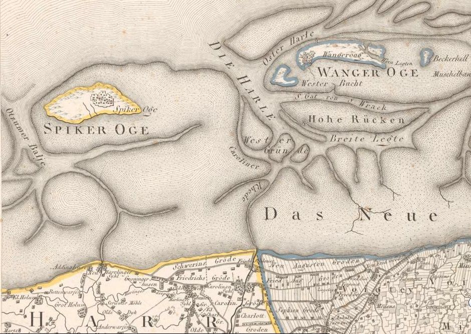 Ausschnitt Spiekeroog, Wangerooge und Harle (Seegatt) aus Karl Ludwig von Le Coqs Werk Topographische Karte in 22 Blättern den größten Theil von Westphalen enthaltend, so wie auch das Herzogthum Westphalen und einen Theil der hannövrischen, braunschweigischen u. heßischen Länder ; nach astronomischen und trigonometrischen Ortsbestimmungen / hrsg. vom General-Major von LeCoq im Jahr 1805. Gest. von Carl Jäck (u. a.). - Berlin, ca. 1805. Digitalisierte Ausgabe der Universitäts- und Landesbibliothek Düsseldorf